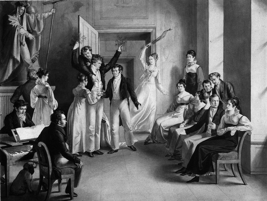 Gesellschaftsspiel in Atzenbrugg; schwarz-weiß Reproduktion eines Bildes von Leopold Kupelwieser